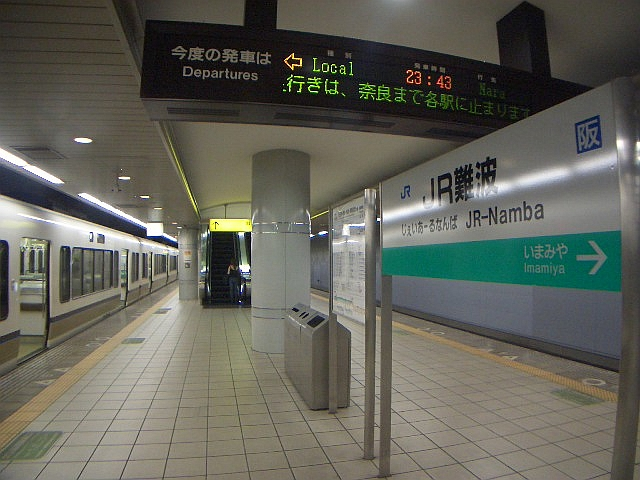 JR-Nanba sta.